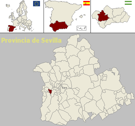 Mapa de localización del municipio sevillano de Benacazón (Andalucía, España)